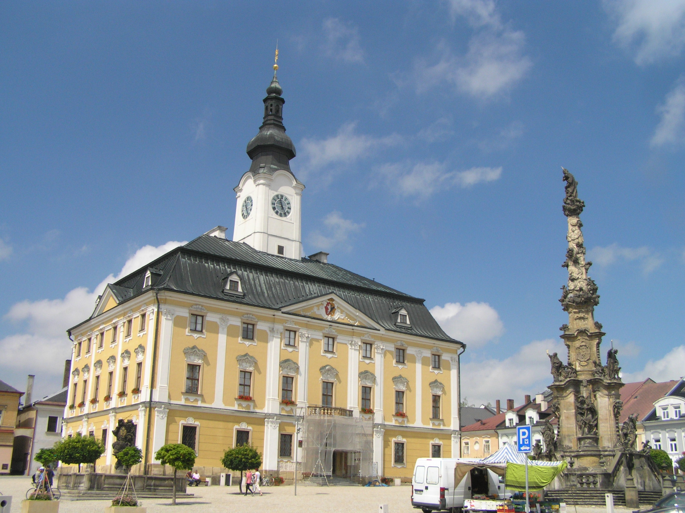 Radnice a sloup se sochou Panny Marie v Poličce